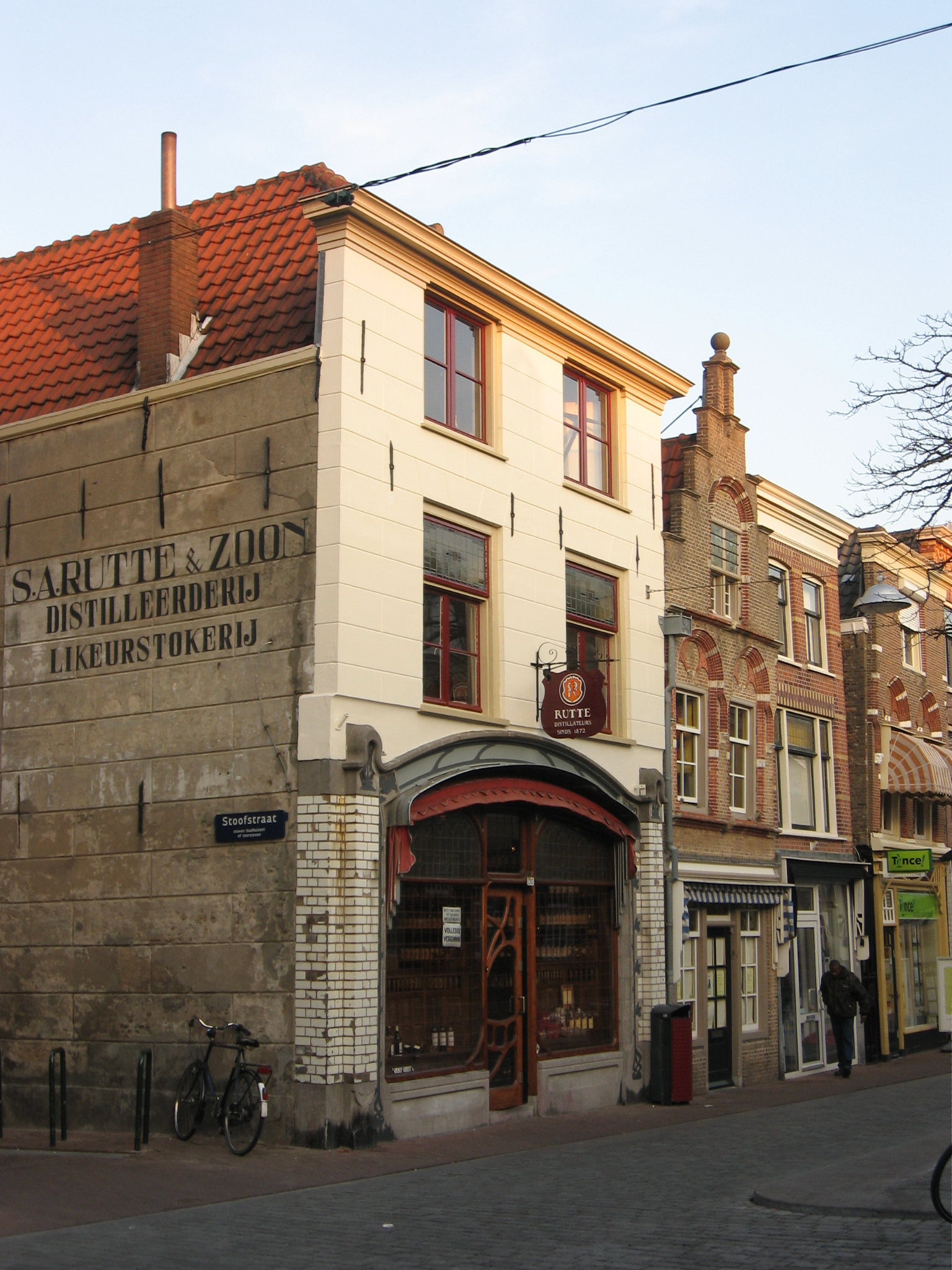 Rutte